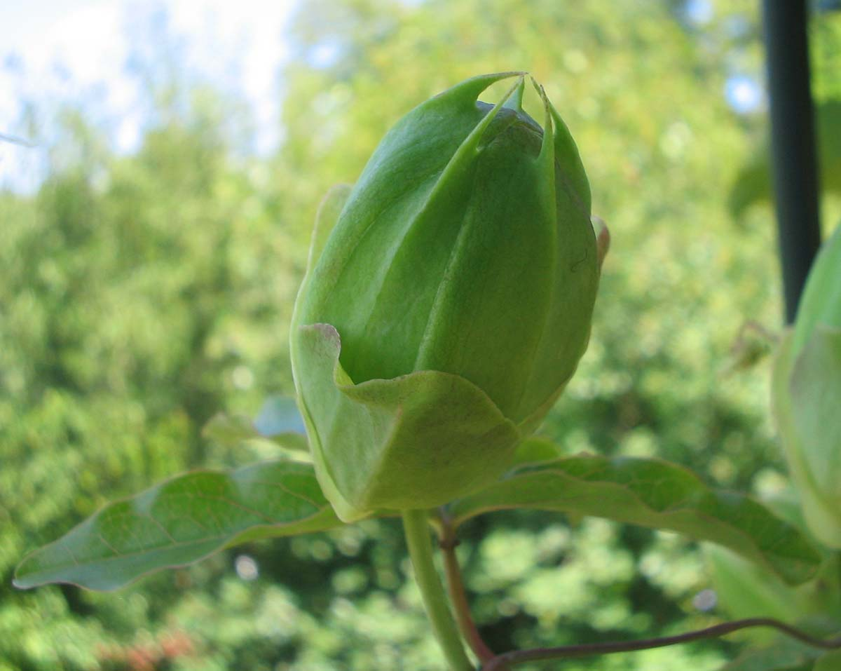 Blaue Passionsblume (Passiflora caerulea): Knospe, Botanischer Garten Salzburg